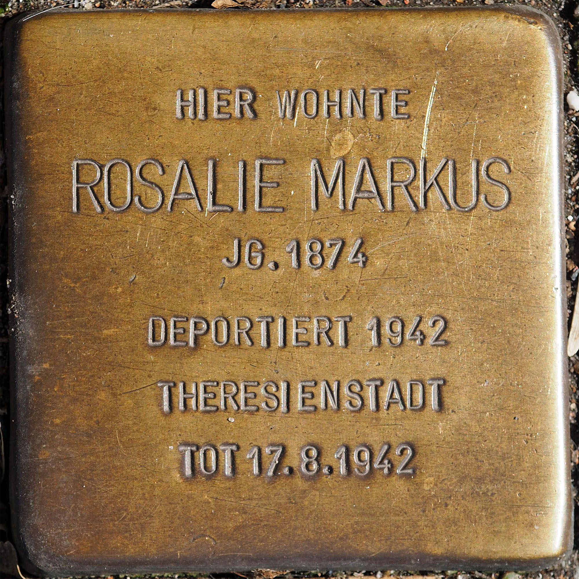 Stolpersteine MG: Markus, Rosalie